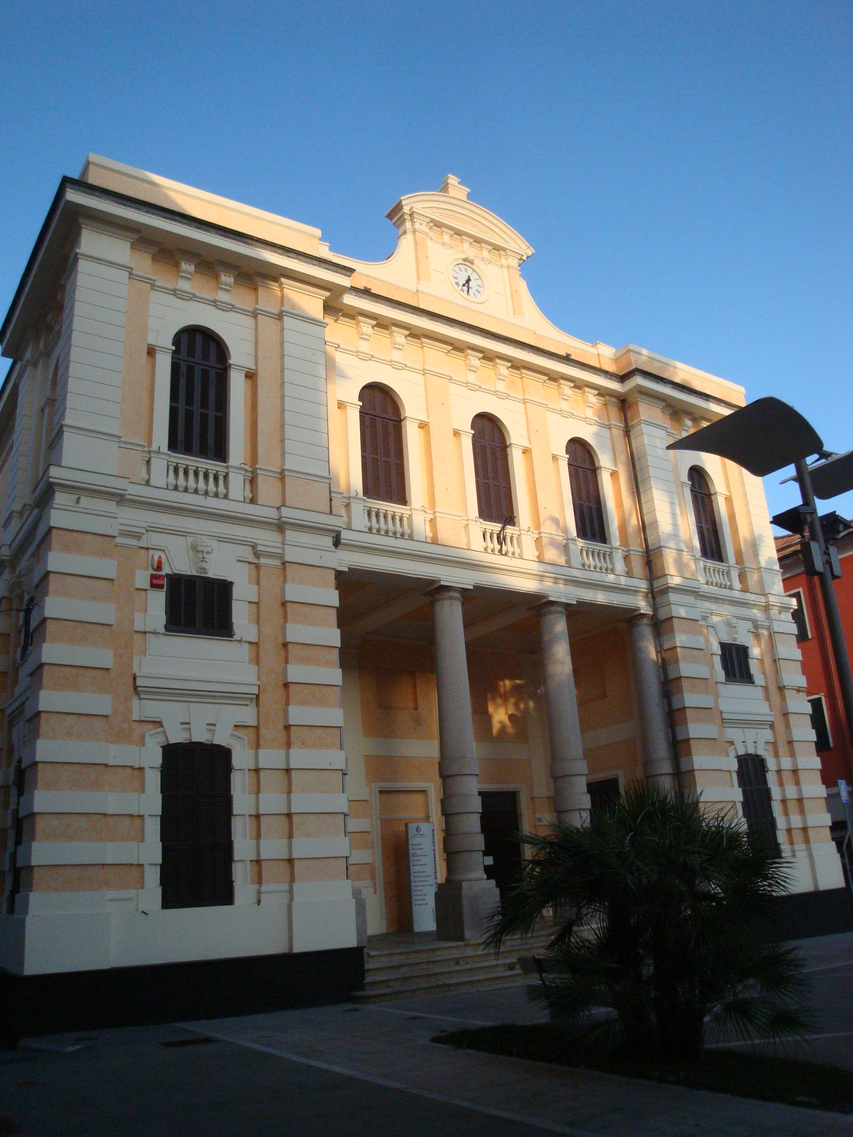 Ex tribunale, dal 2009 biblioteca Civica Lagorio, Imperia (Italia)